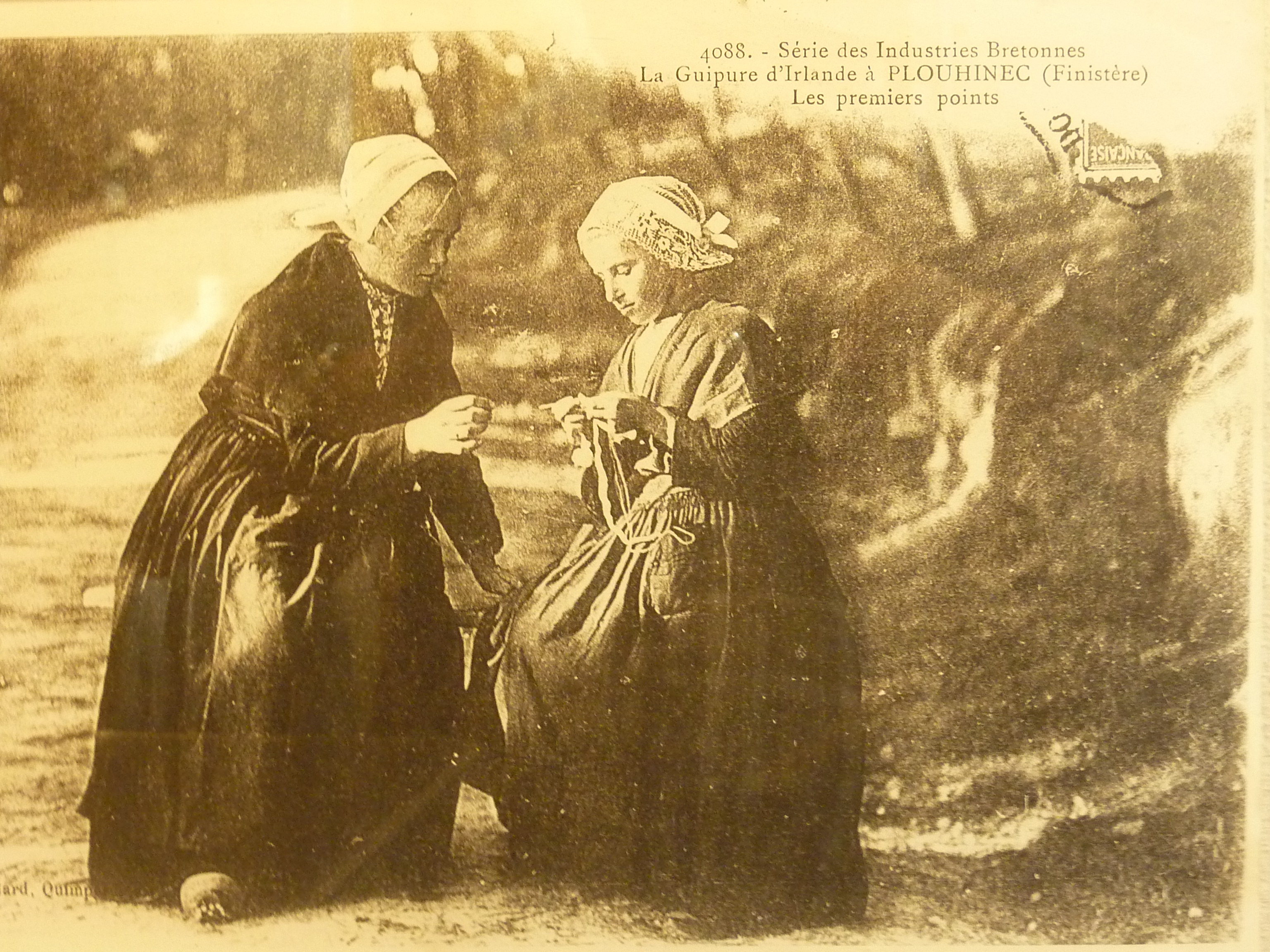 Broderie de guipure d'Irlande à Plouhinec (Finistère) (vers 1910, carte postale Villard)